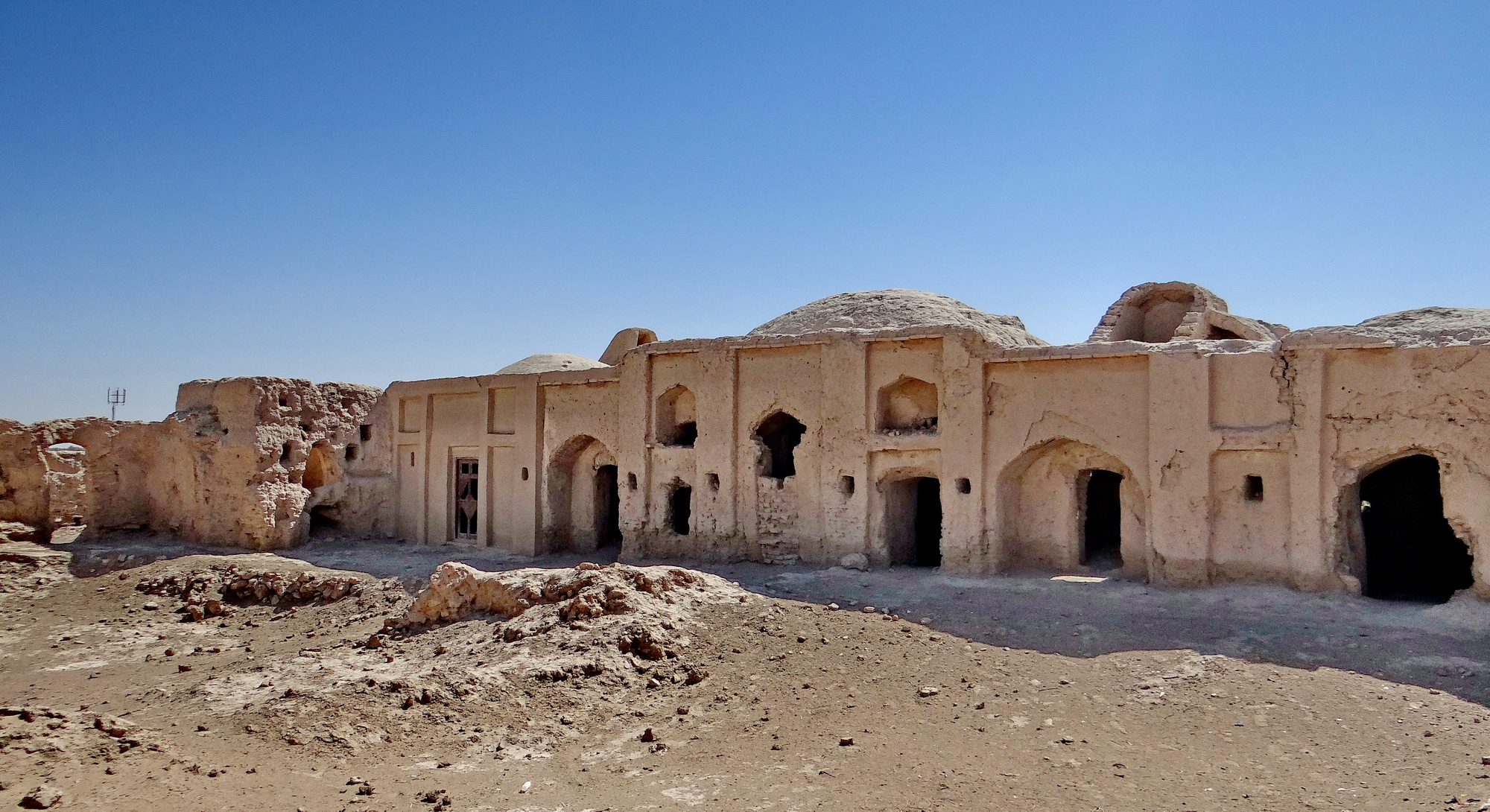 اتشکده کرکویه